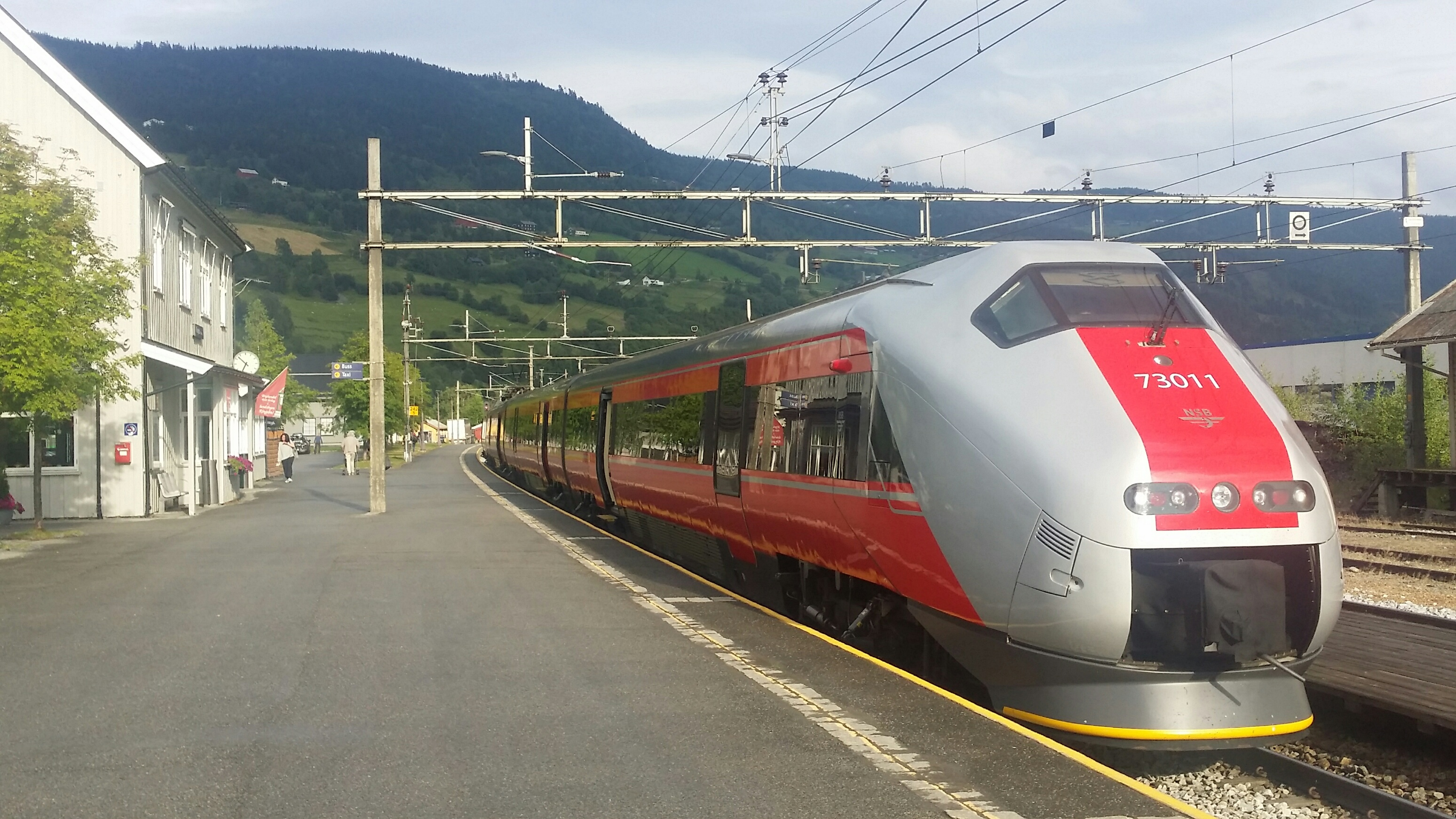 Tog fra Oslo til Trondheim på Ringebu stasjon